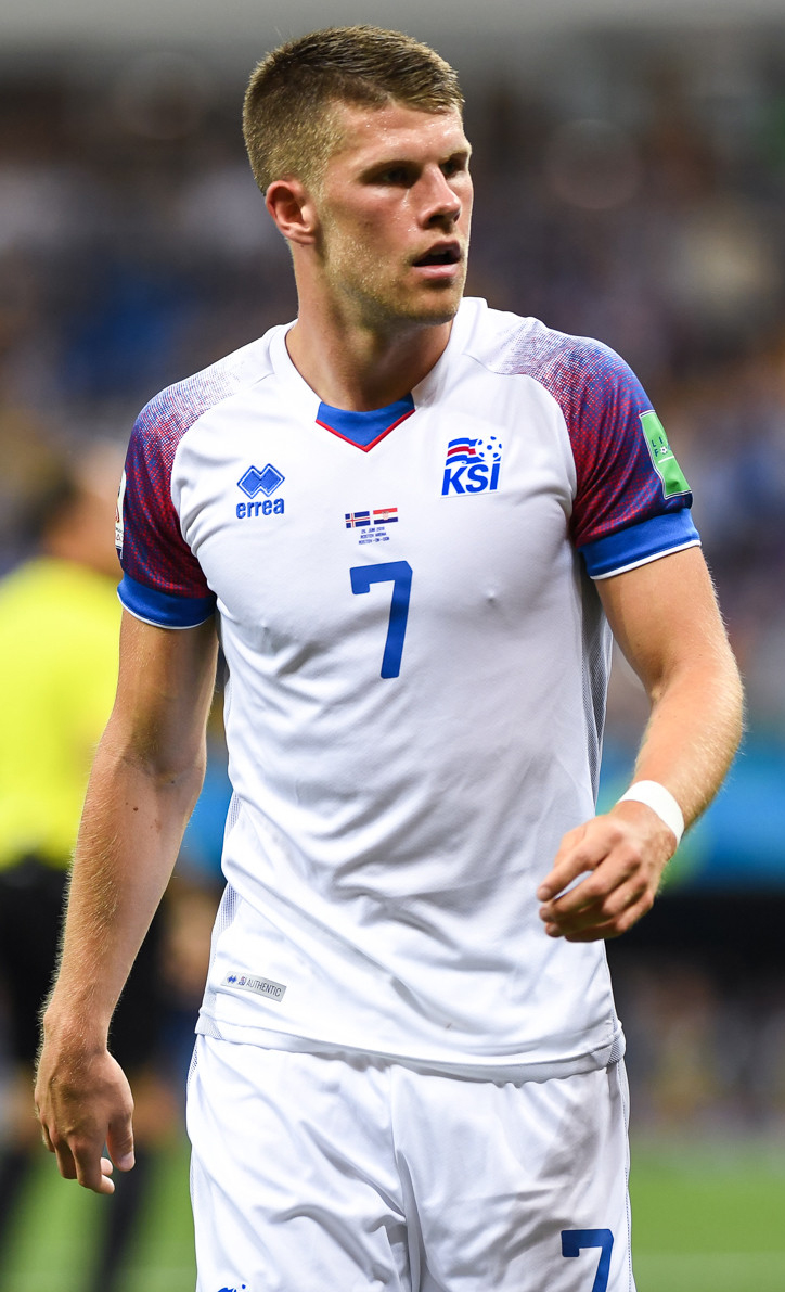 Сборная Исландии уступает Хорватии и покидает ЧМ-2018